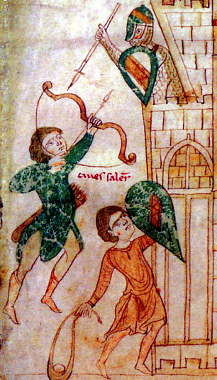 Dobývání